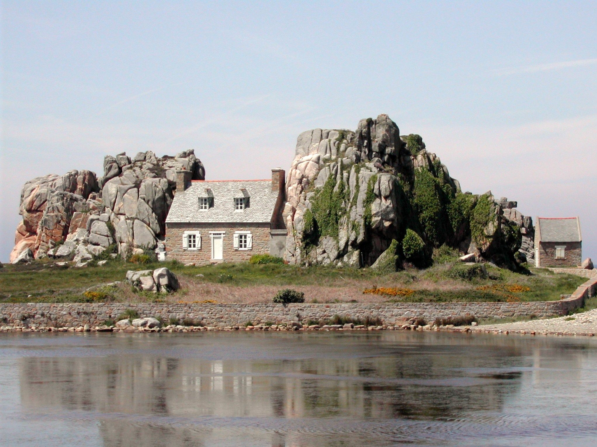 Castel meur Plougrescant Côtes-d'Armor Bretagne